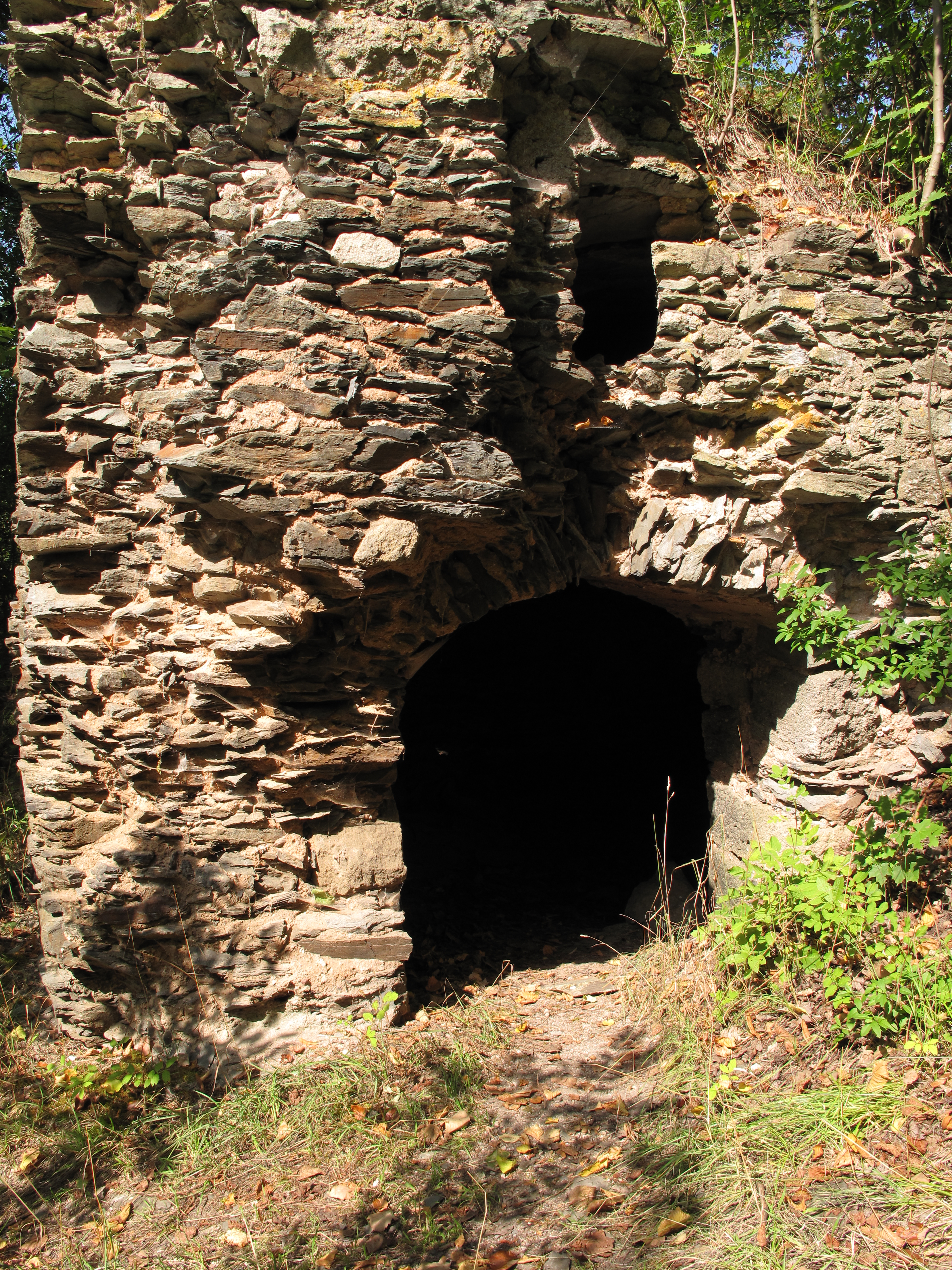 Zřícenina hradu Preitenstein (Nečtiny). Okres Plzeň-sever, Česká republika.